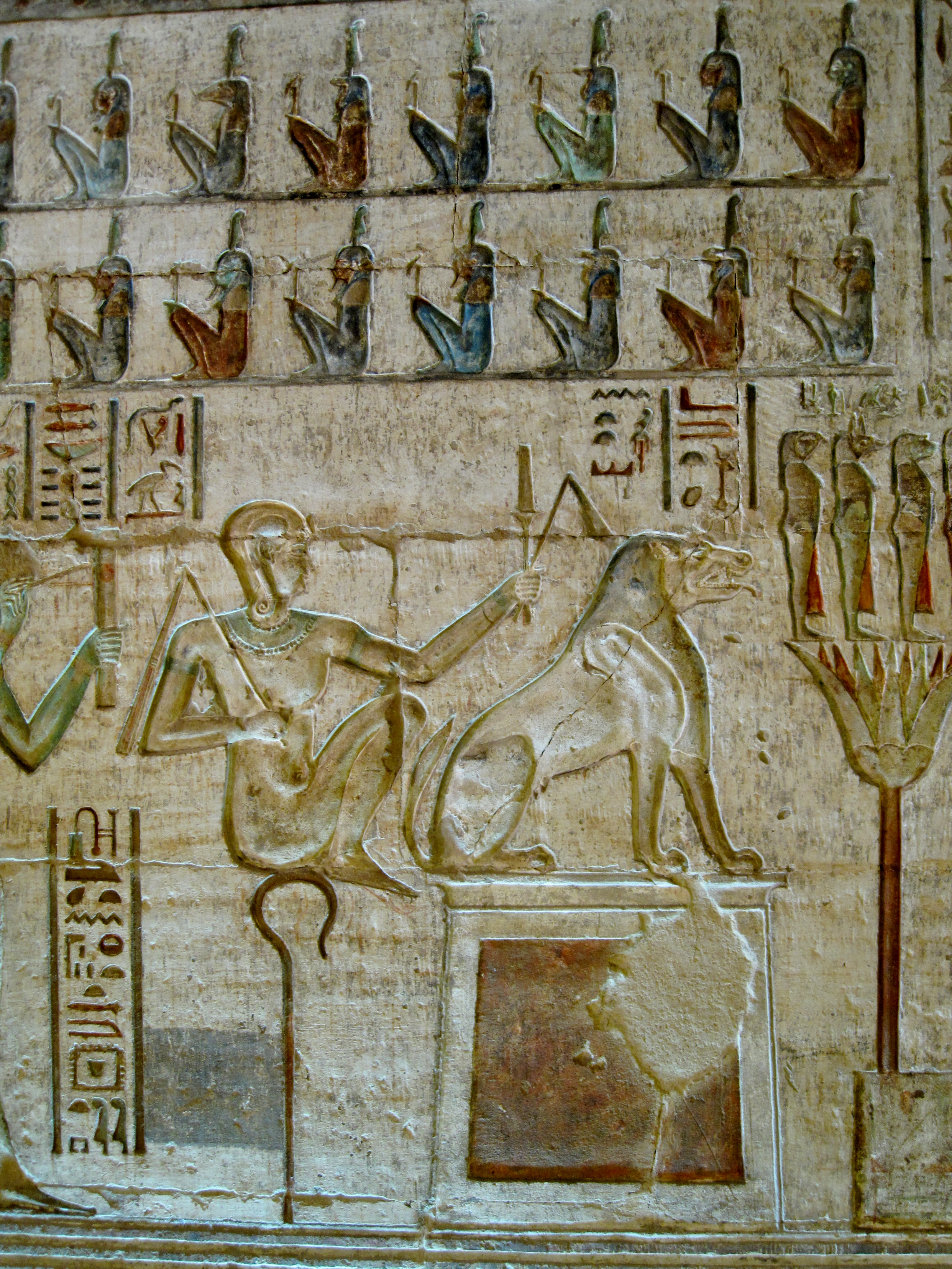 Relief im Innenraum des Hathor-Tempels von Deir el-Medina („Kloster der Stadt“), altägyptisch Set Maat („Platz der Wahrheit“), in Theben-West bei Luxor, Ägypten